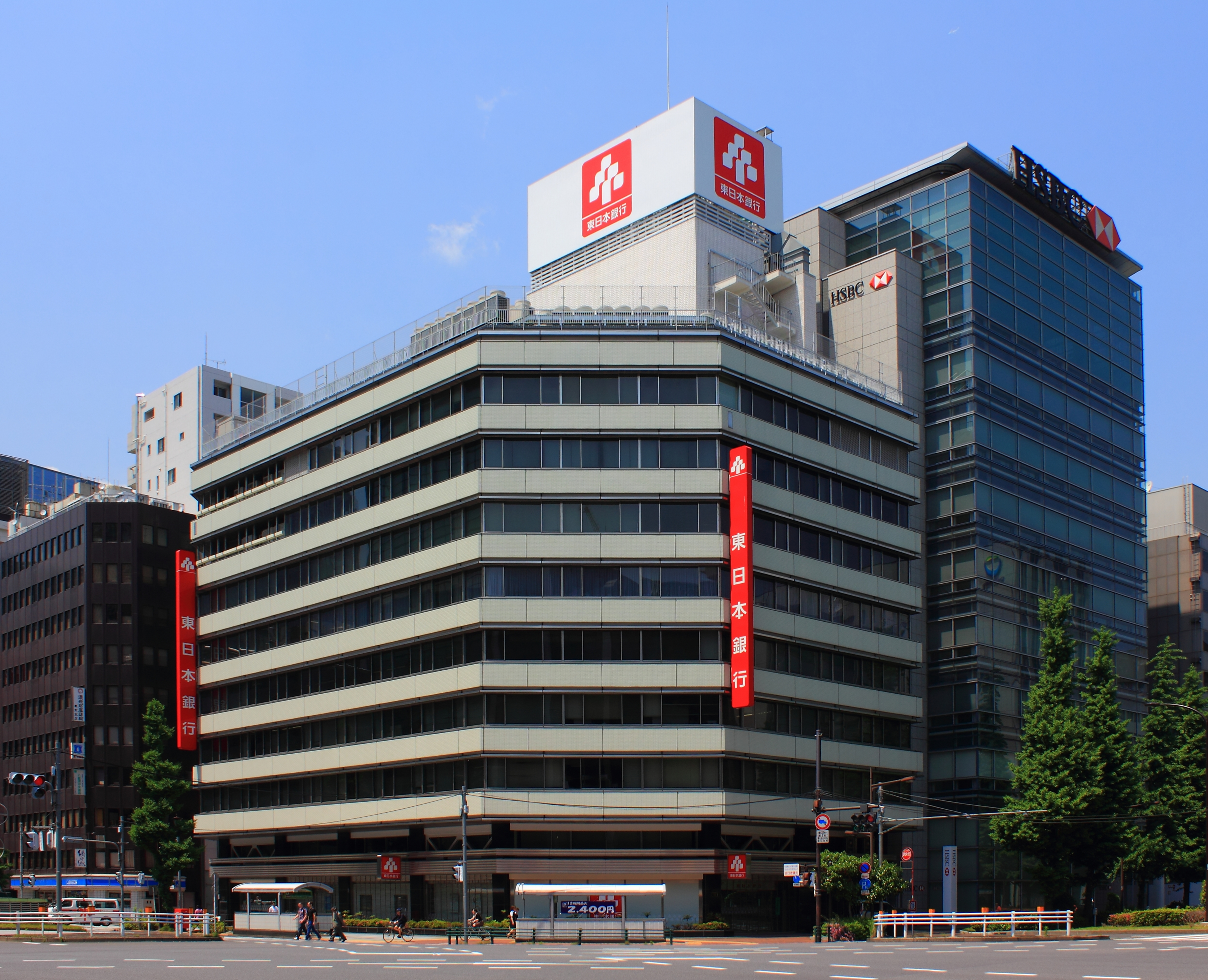 東日本銀行本店（東京都中央区）